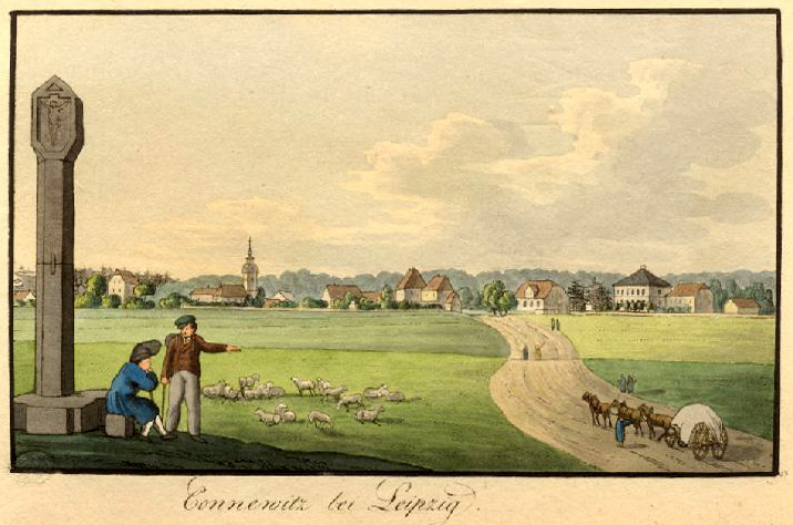 Blick nach Connewitz vom Kreuz aus, um 1800